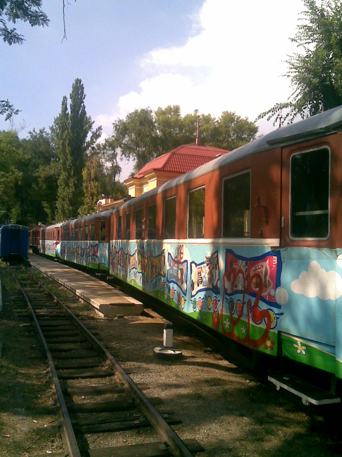 Вагоны Pafawag, Днепропетровская ДЖД